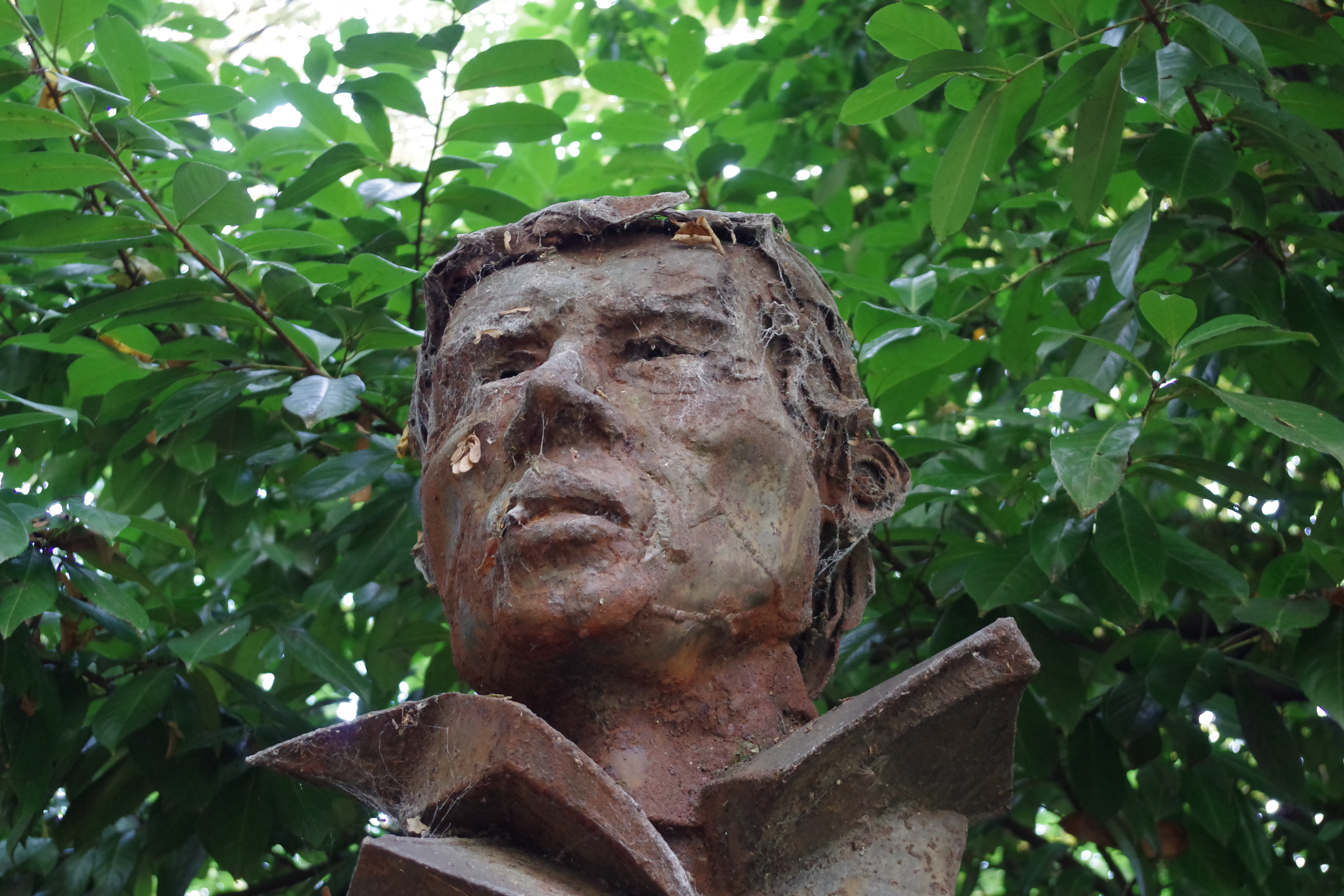 Buste de Jacques Brel situé dans le parc du même nom à Forest